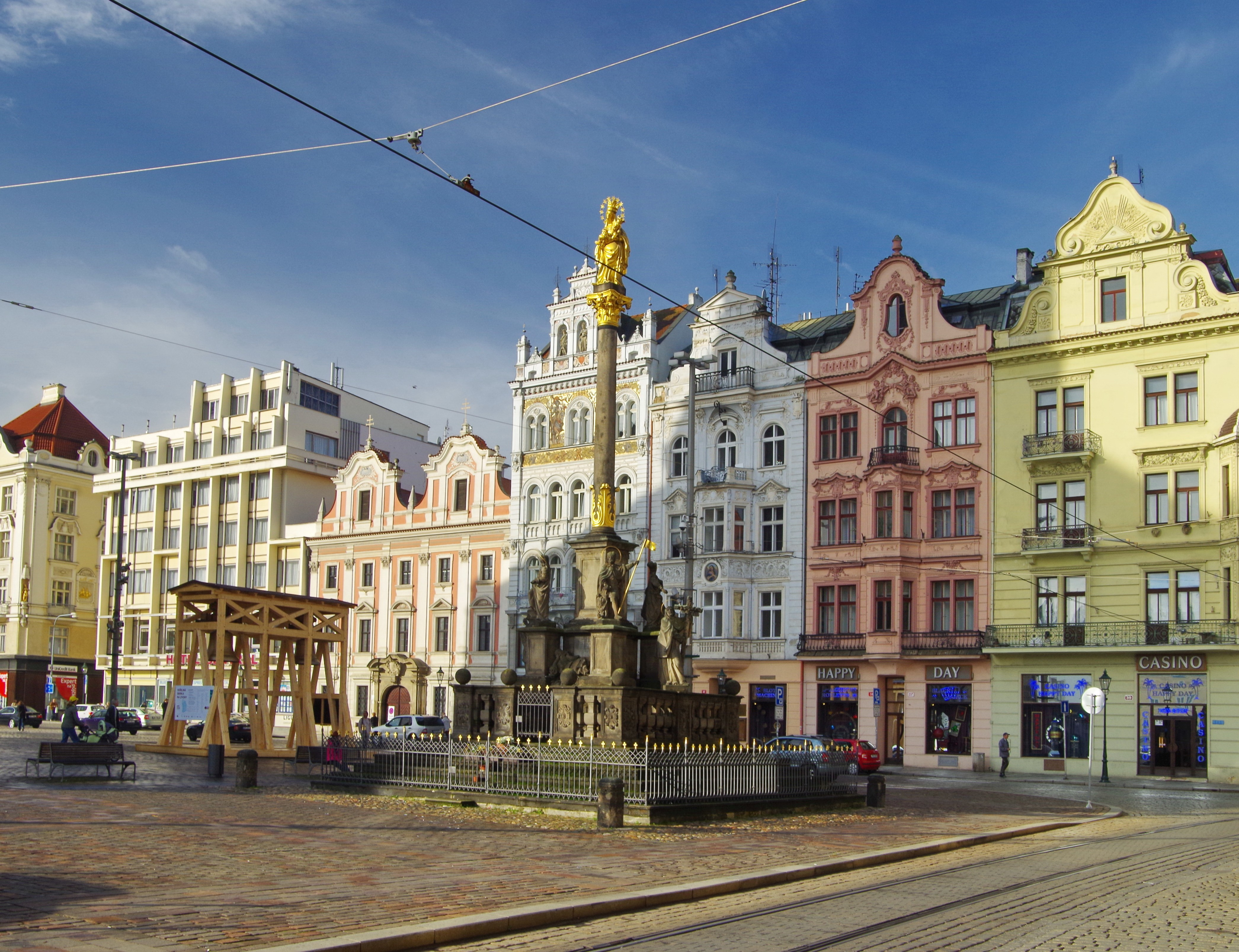 Am Platz der Republik, Vordergrund Pestsäule